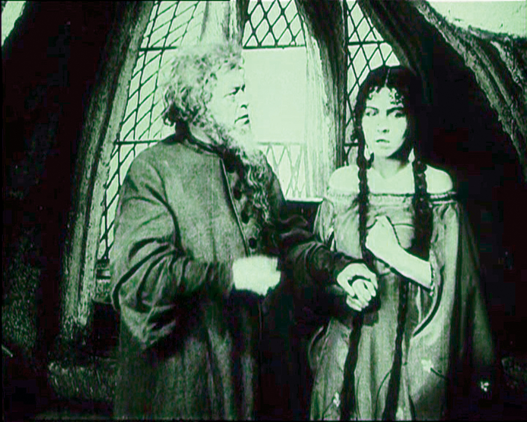 Zdjęcie z filmu "Der Golem" (1915)